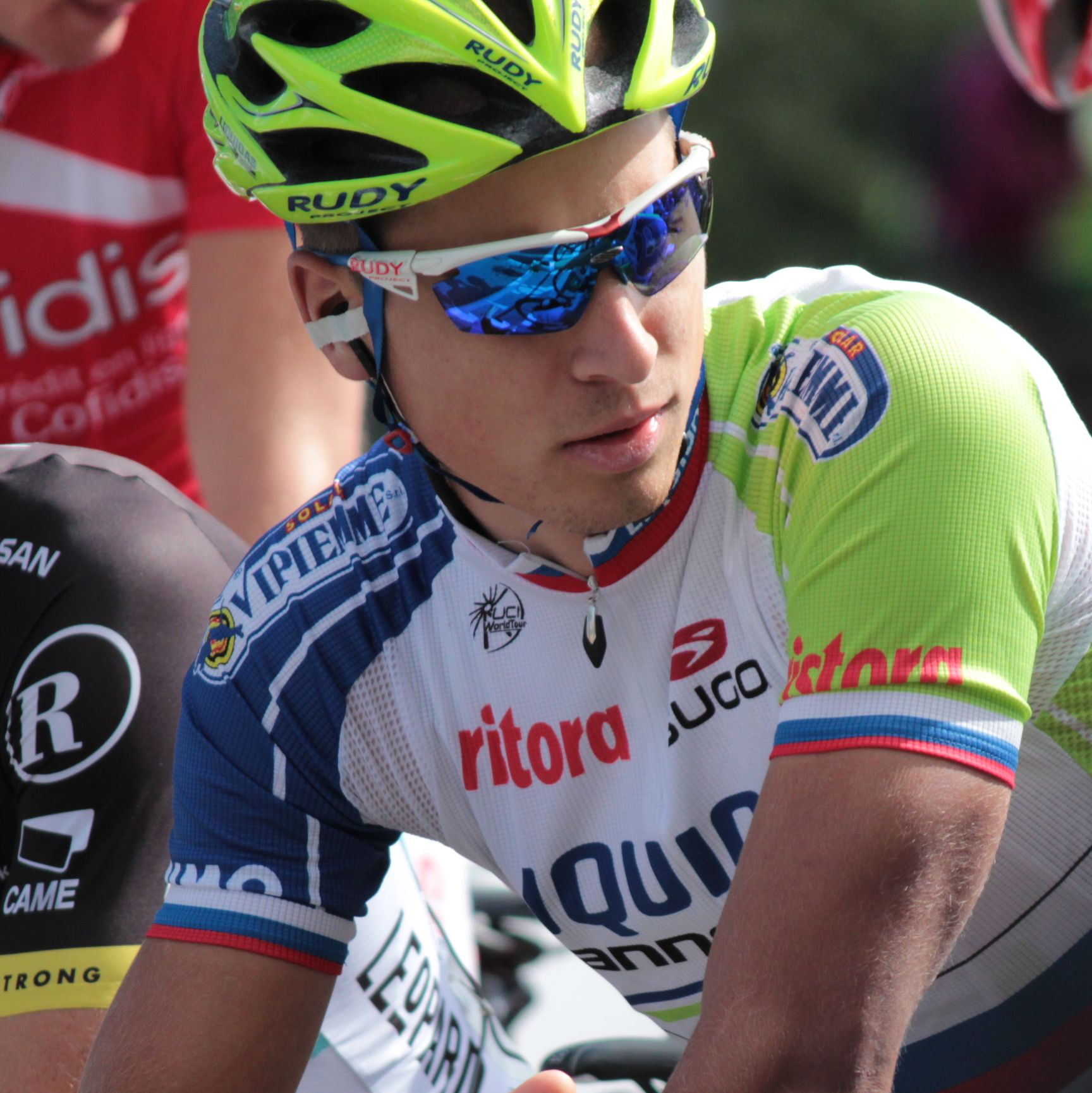 SqIMG_1033